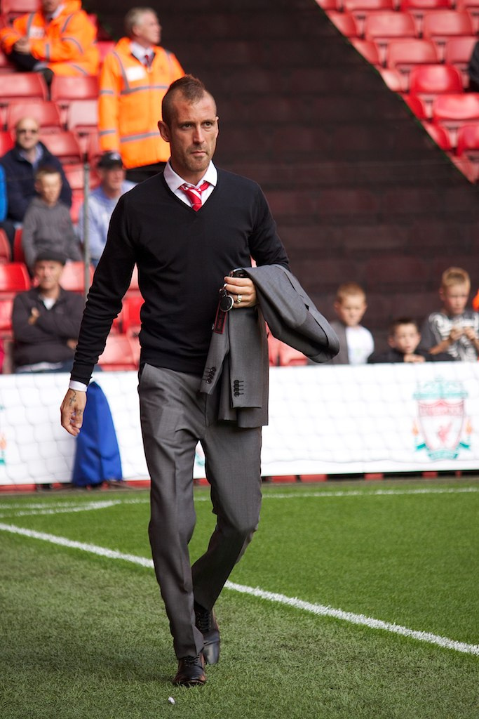 Liverpool vs Bolton 27/08/2011